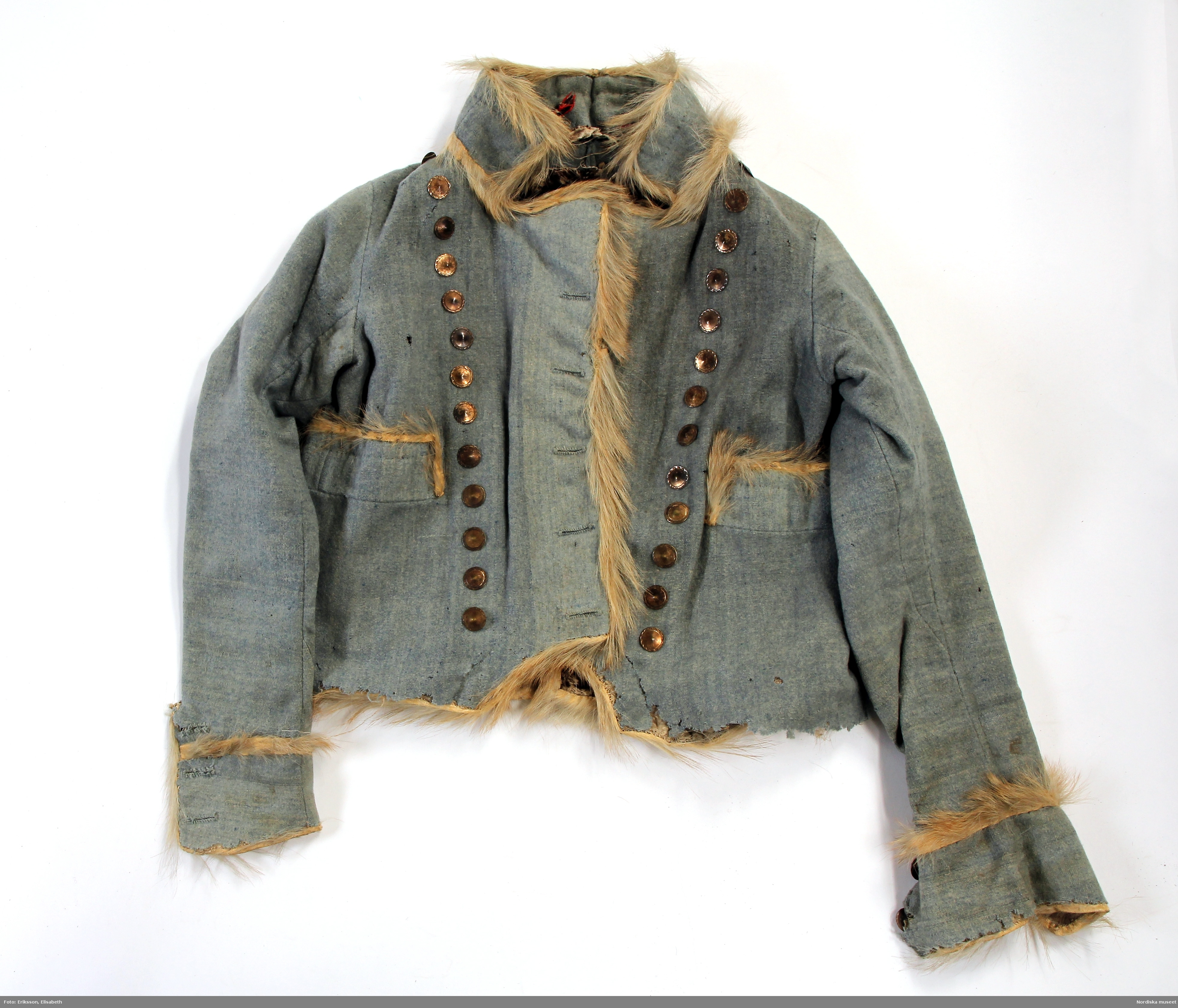 Rock